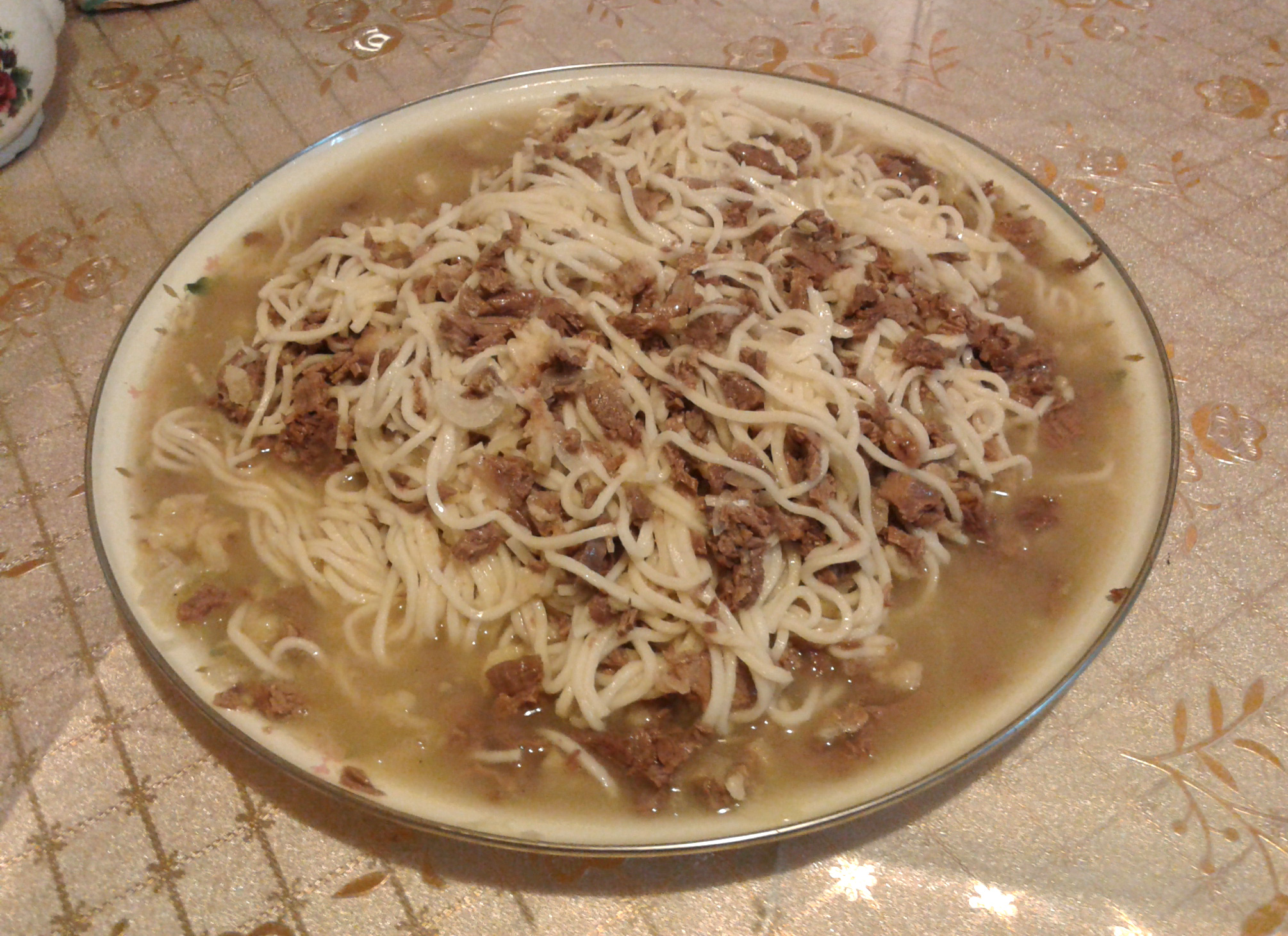 Бешбармак - крошеное мясо с лапшой и луковым соусом